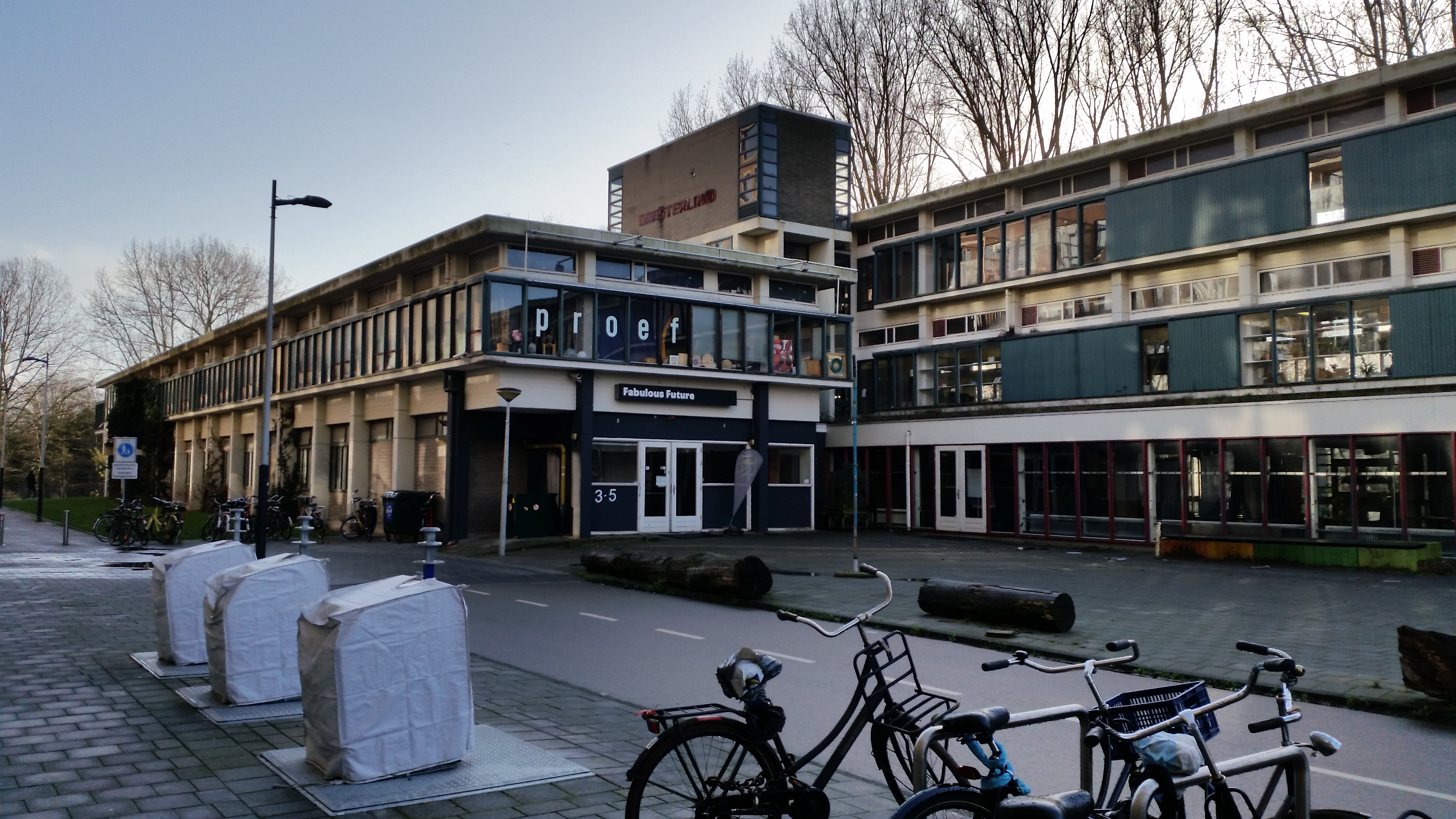 Impressie van Gaasterlandstraat 3-5, Amsterdam-Zuid. Gebouw uit 1971-1973, dat in eerste instantie in 2018/19 gesloopt moest worden, maar toen bewaard bleef om te bekijken of het een monument kon worden. Wordt vermoedelijk in 2020 alsnog gesloopt